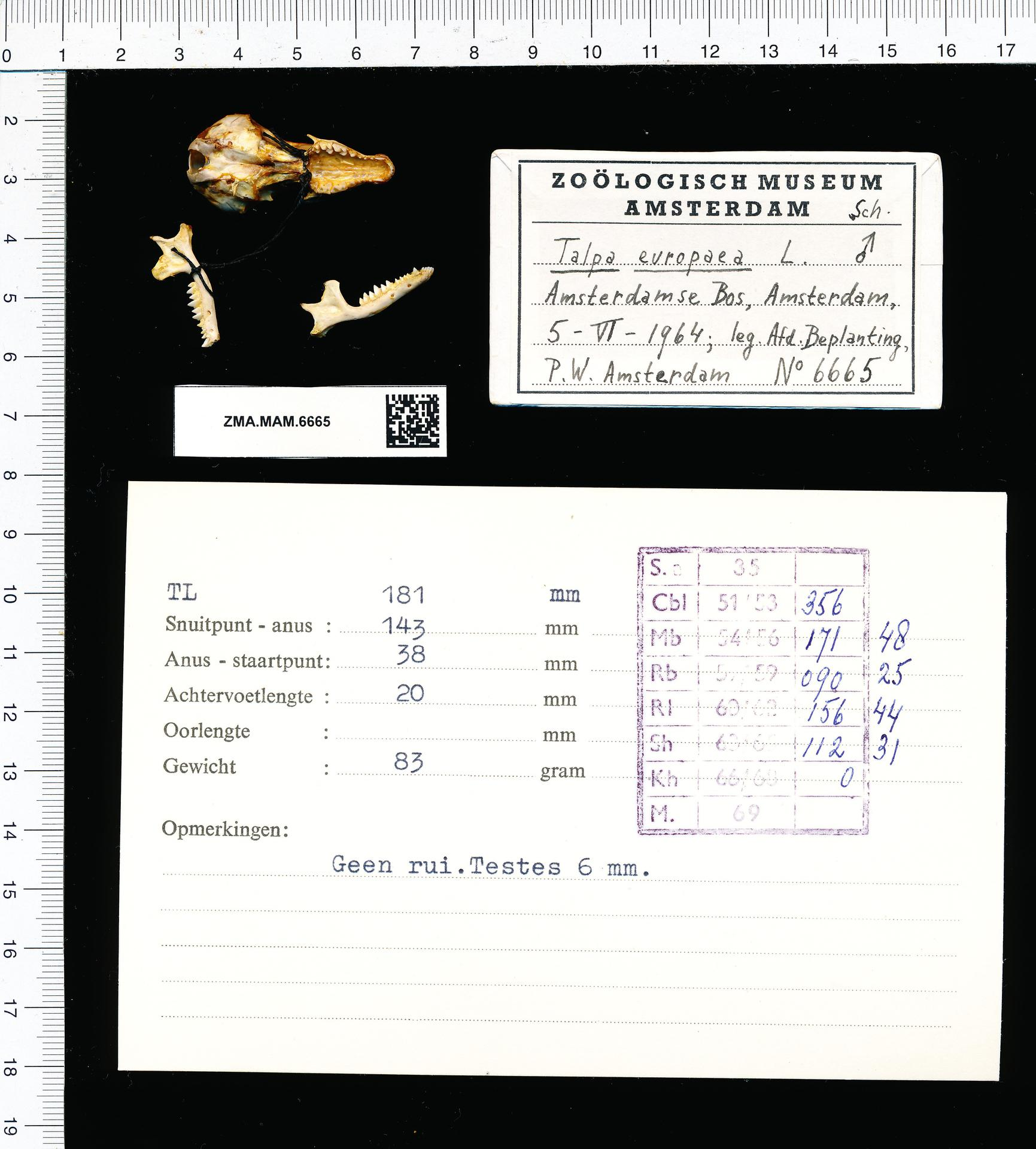 Talpa europaea Linnaeus